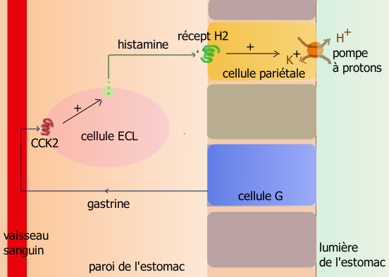 Régulation de la sécrétion acide de l'estomac